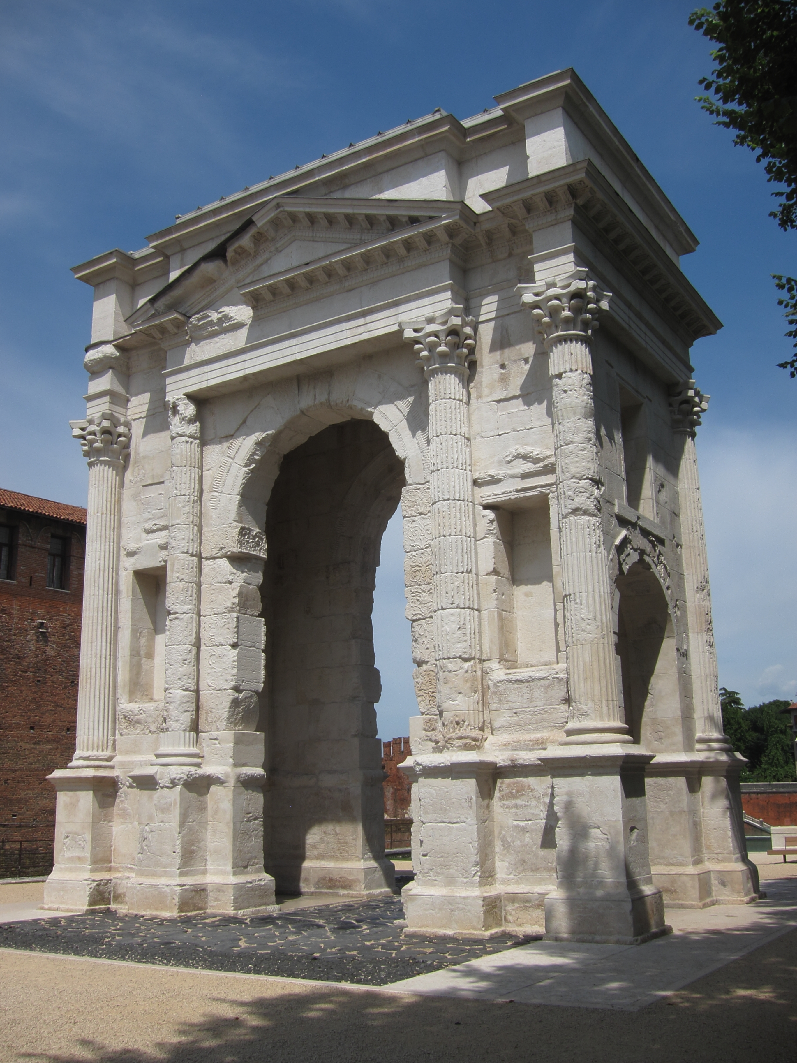 Arco dei Gavi, Verona, Piazetta Castelvecchio